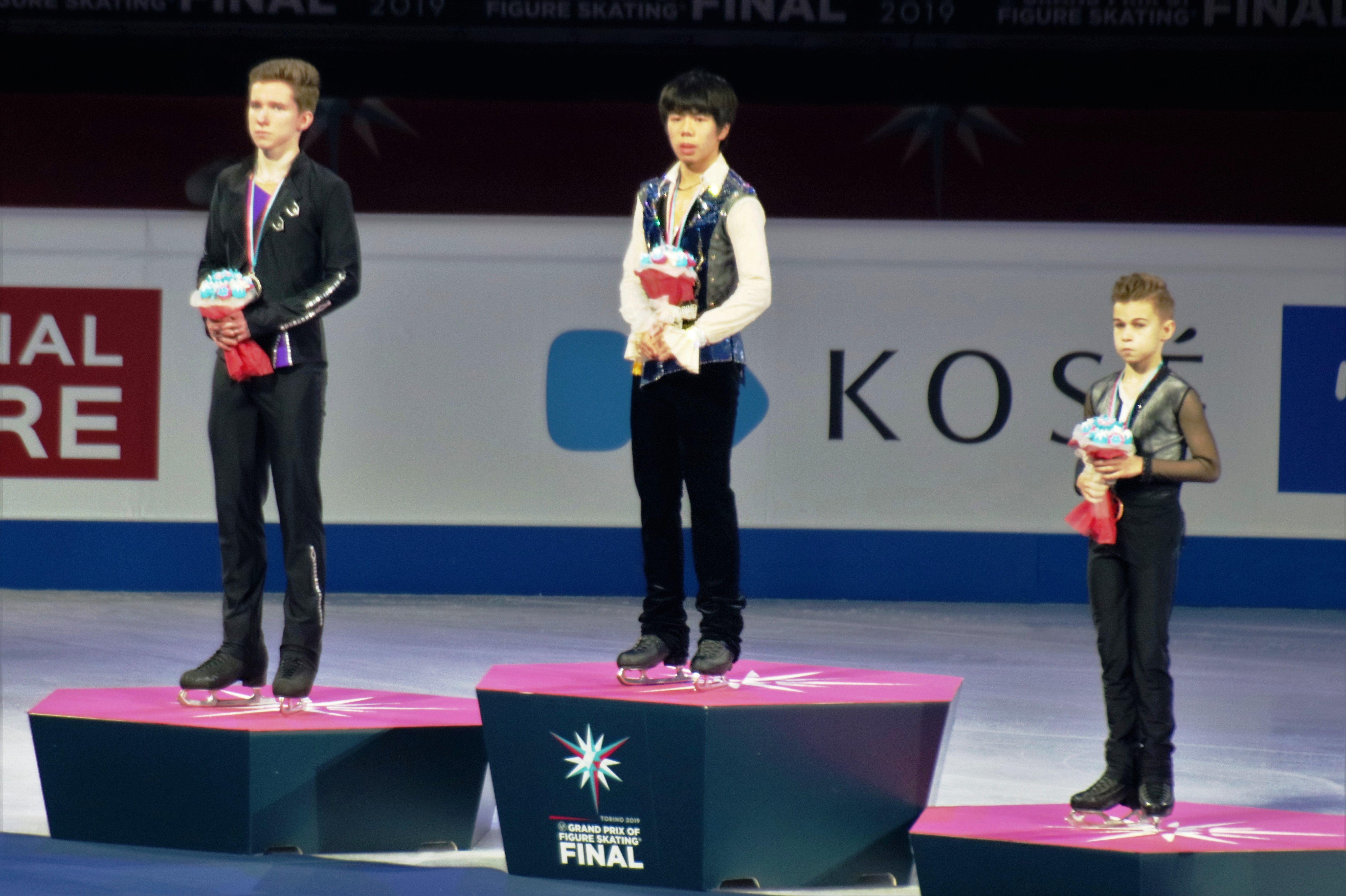 Церемония награждения в мужском одиночном катании на финале юниорского Гран-при 2019-2020